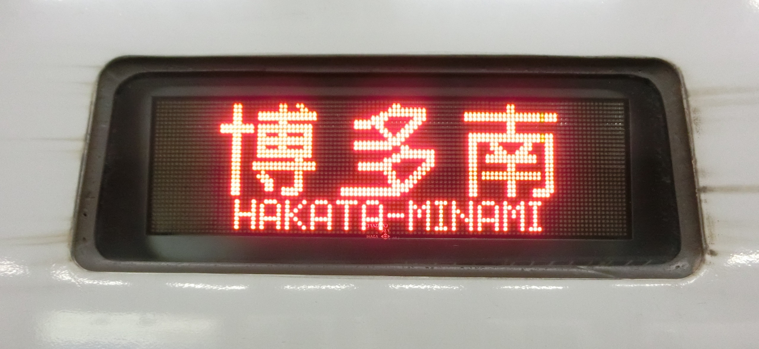 700系新幹線（レールスター）の博多南行きLED表示